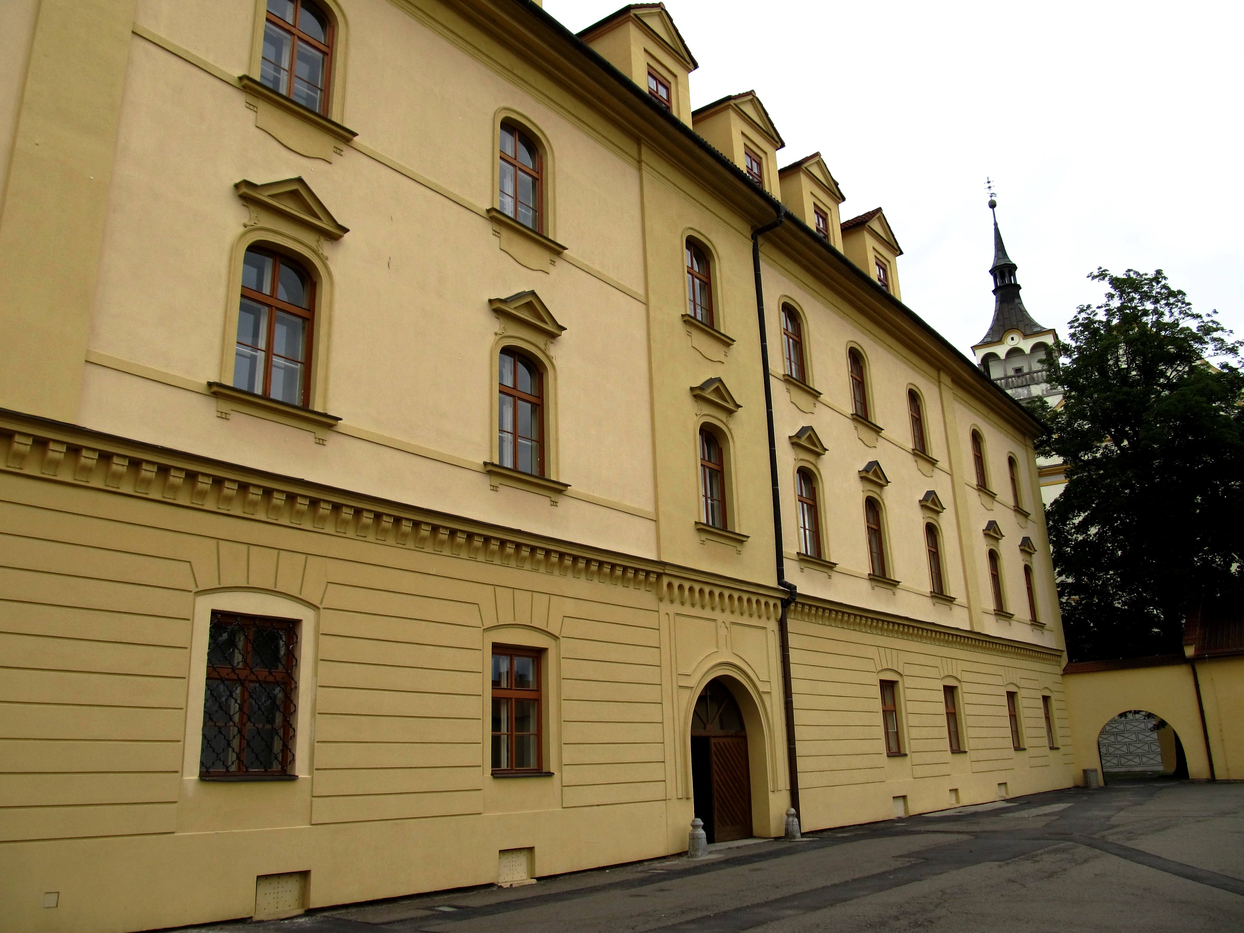 Zámek Lipník nad Bečvou